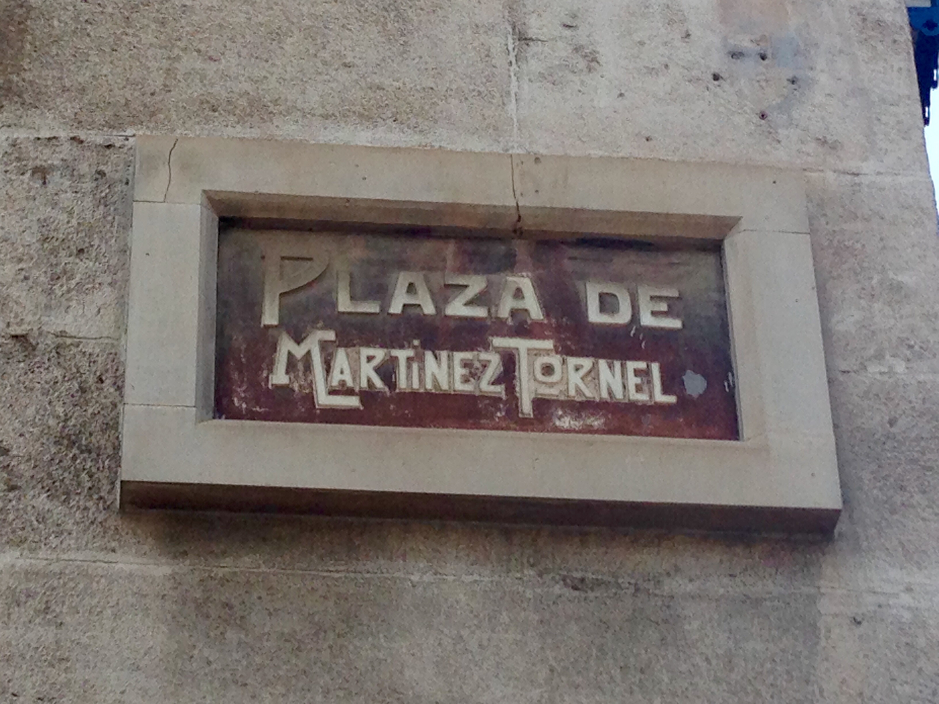 Placa de la Plaza de Martínez Tornel situada en el centro de la ciudad de Murcia